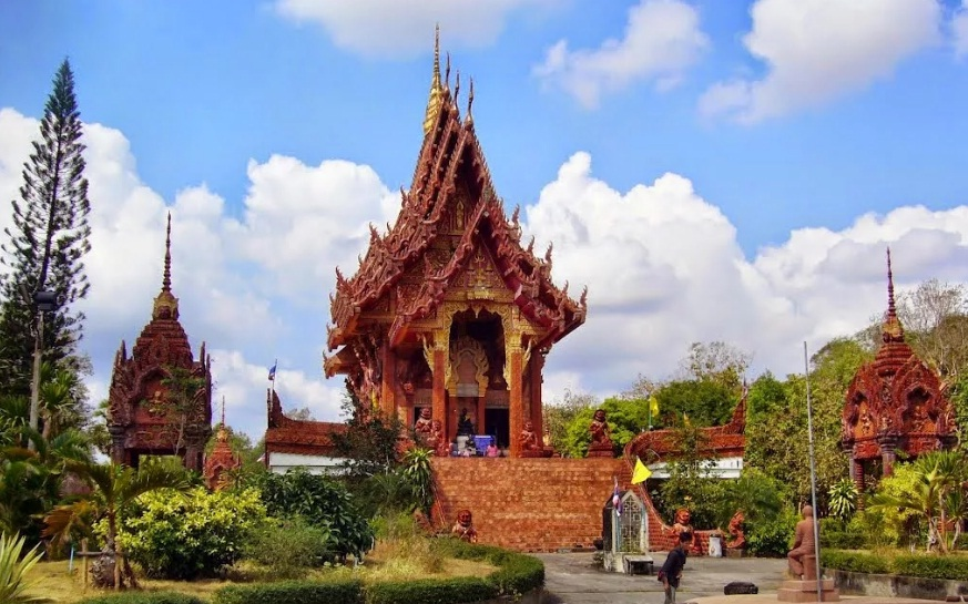 พระอุโบสถ วัดภูเขาแก้ว